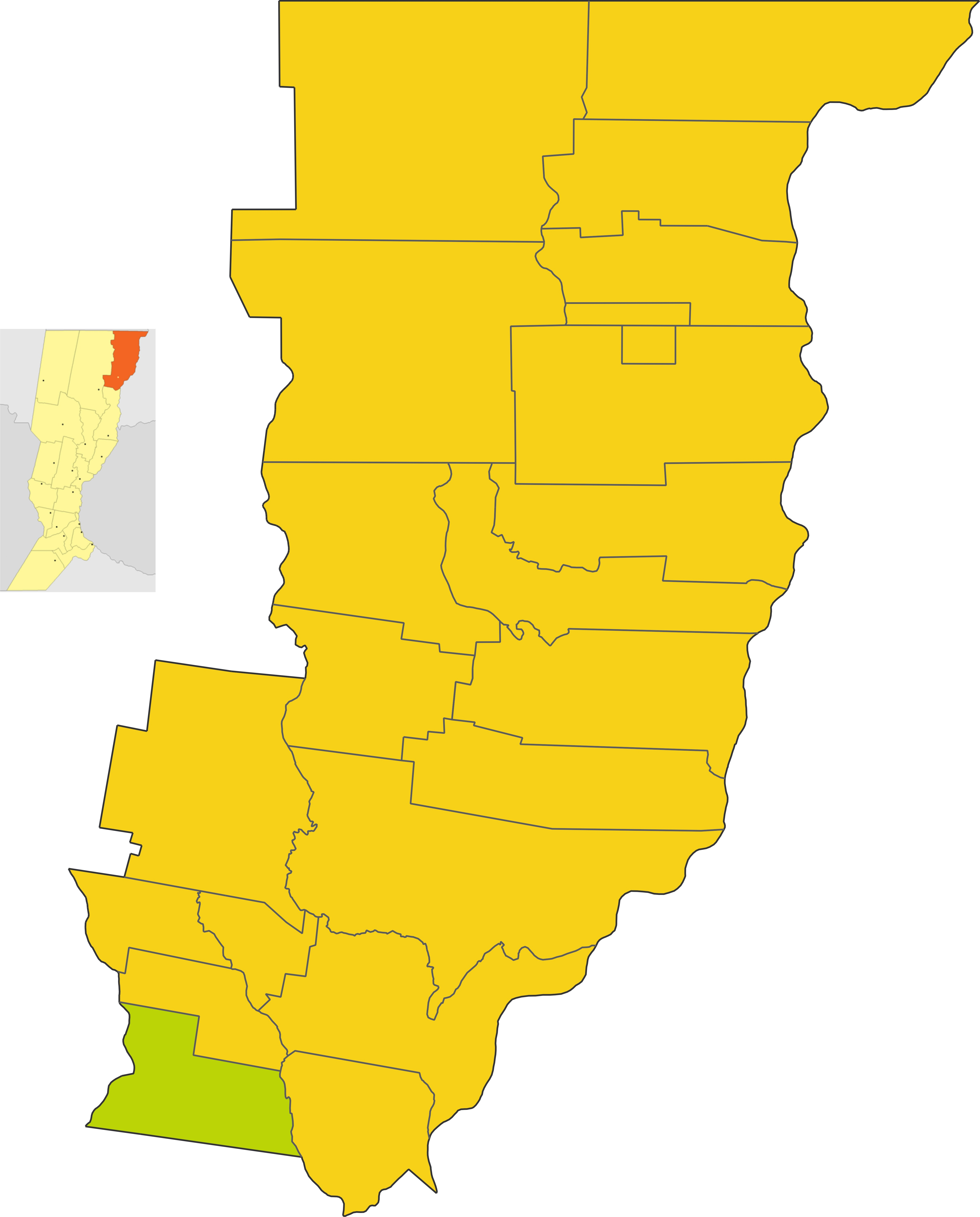 Map of the municipio de Malabrigo in General Obligado department, Santa Fe province, Argentina